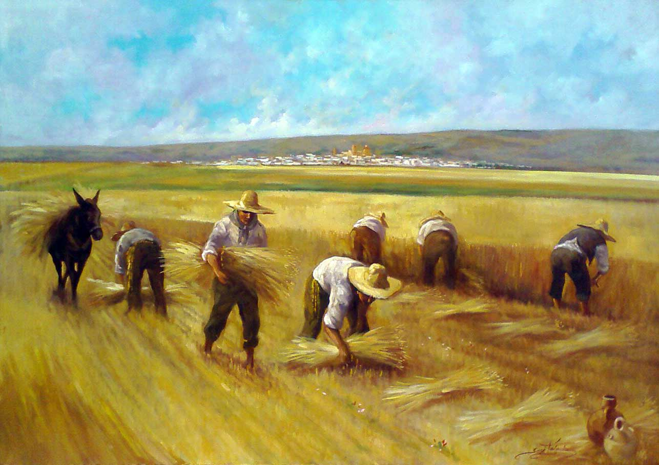 Oleo sobre Lienzo. Vista restrospectiva de la siega en Sisante.